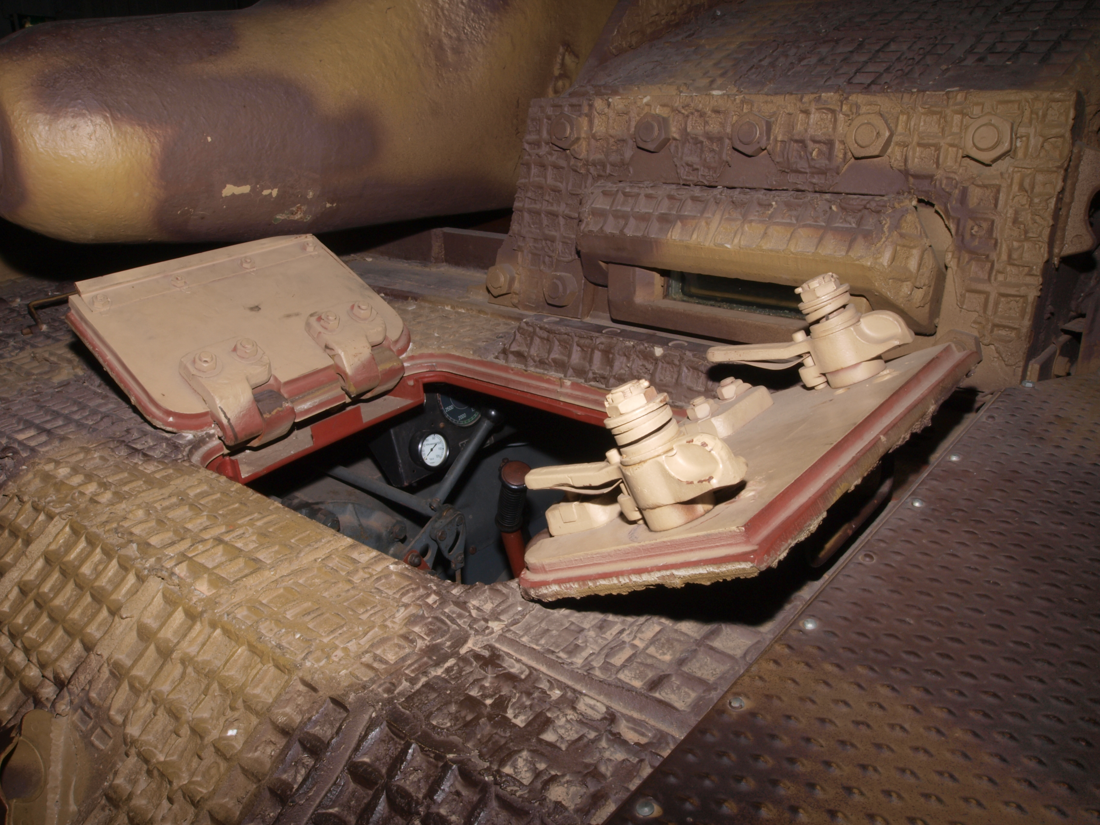 Sturmgeschütz III G SdKfz 142/1